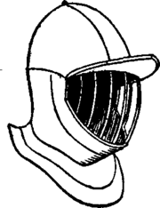 Бургіньёт перыяду 1-й чвэрці 17 ст.